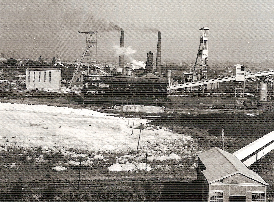 La fosse n° 6 - 6 bis - 6 ter de la Compagnie des mines de Bruay était un charbonnage constitué de trois puits situé à Haillicourt, Pas-de-Calais, Nord-Pas-de-Calais, France.